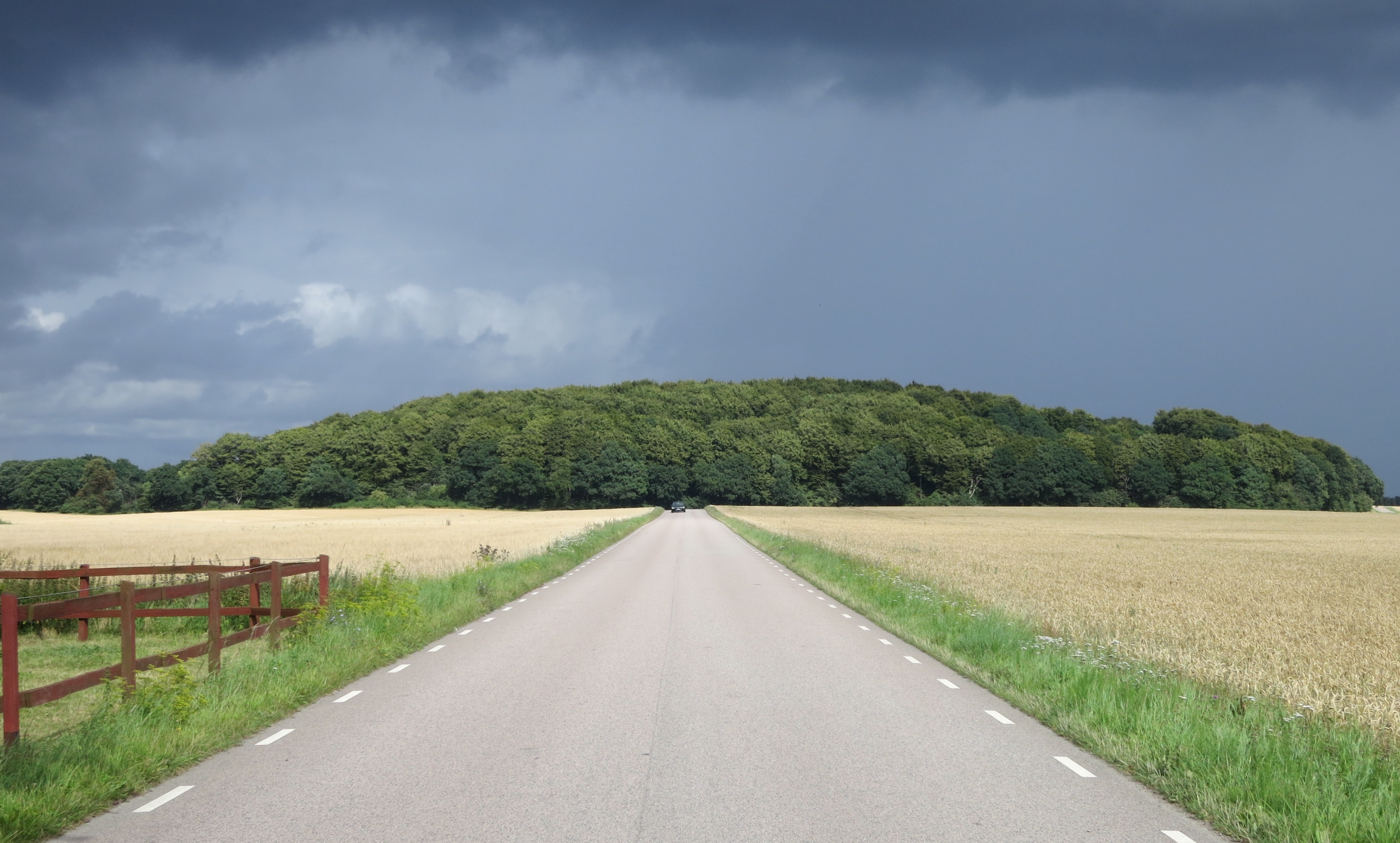 Törringelund